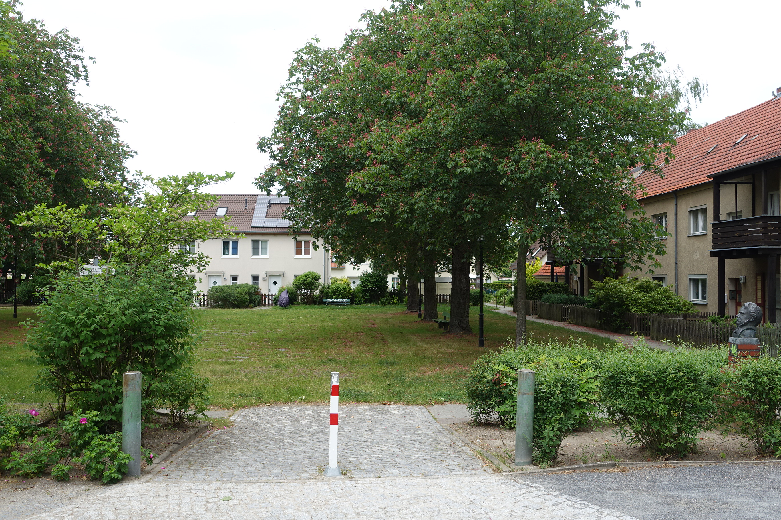 Straßenpanorama